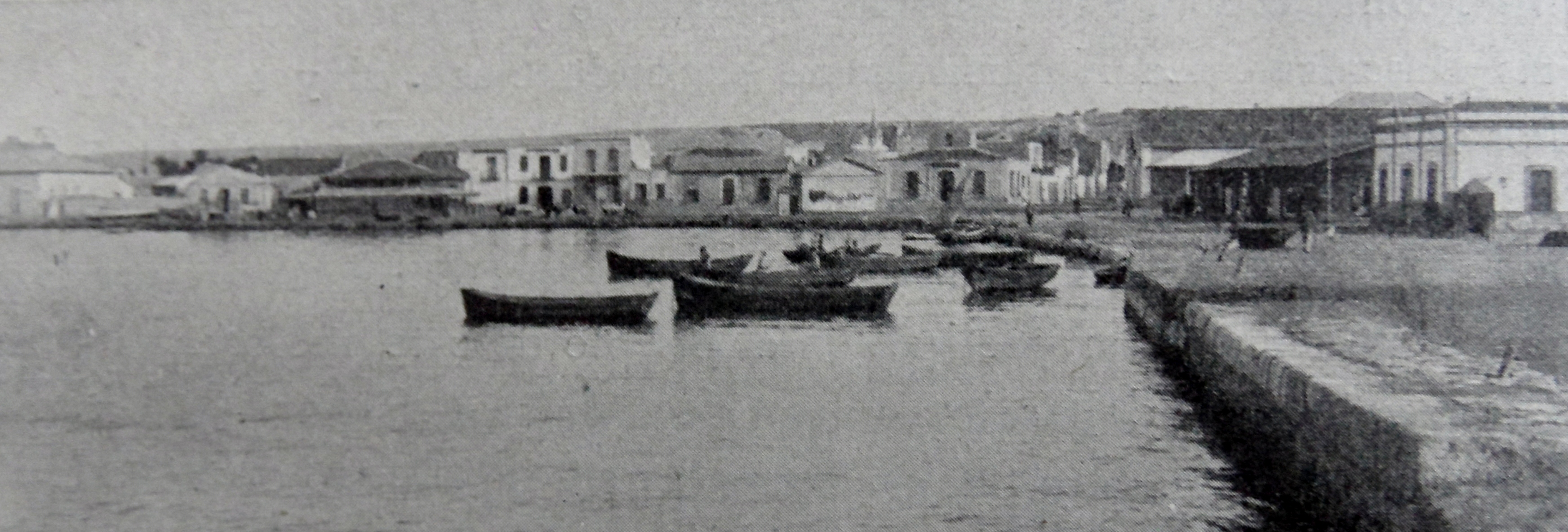 Port de Santa Pola.